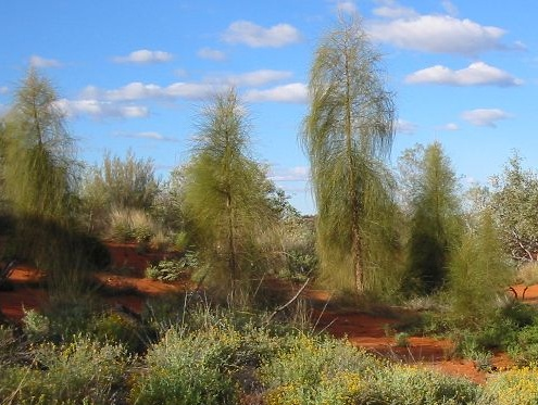 Allocasuarina decaisneana (Desert Oaks), Central Australia.